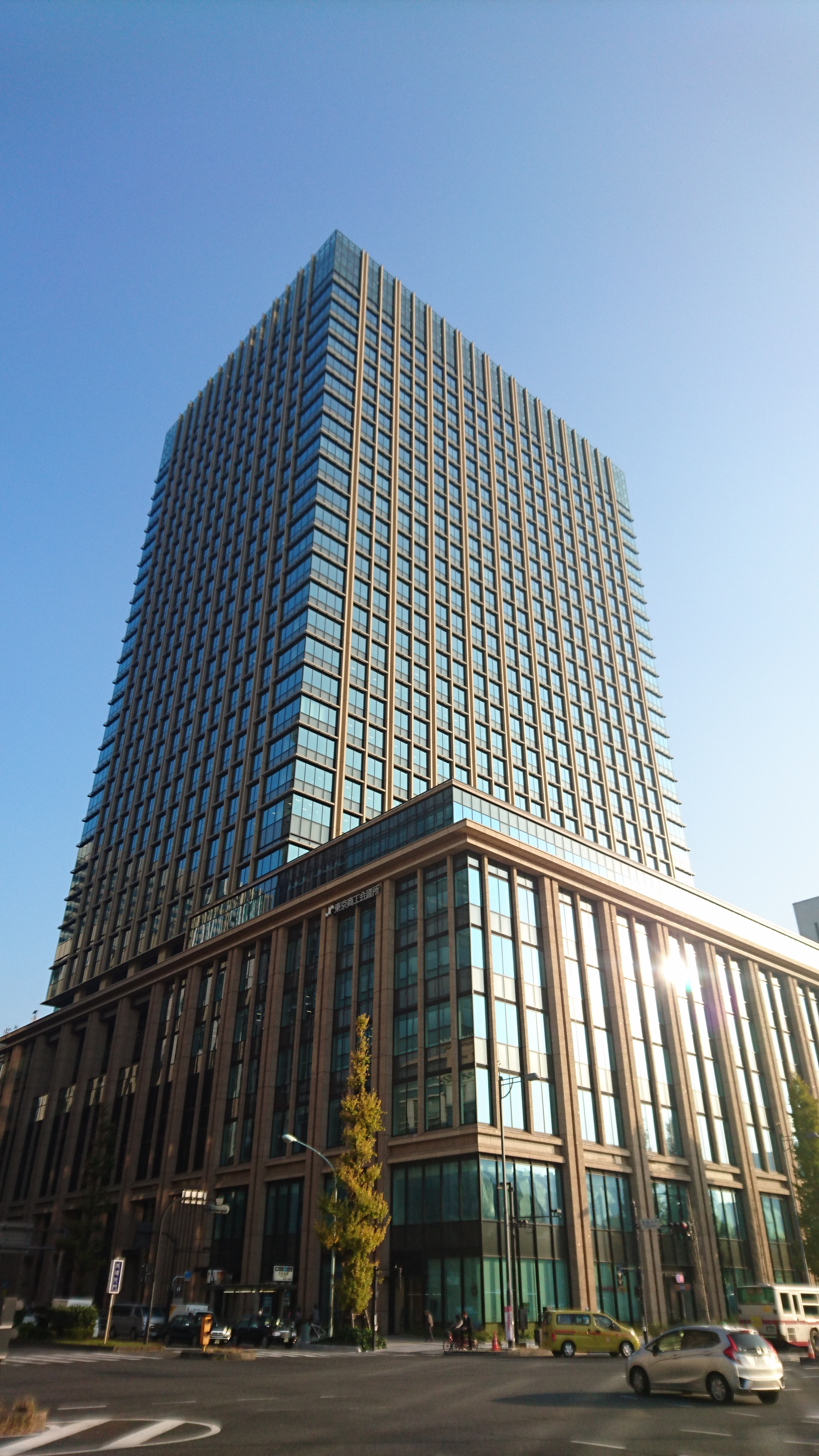 丸の内二重橋ビルの外観。